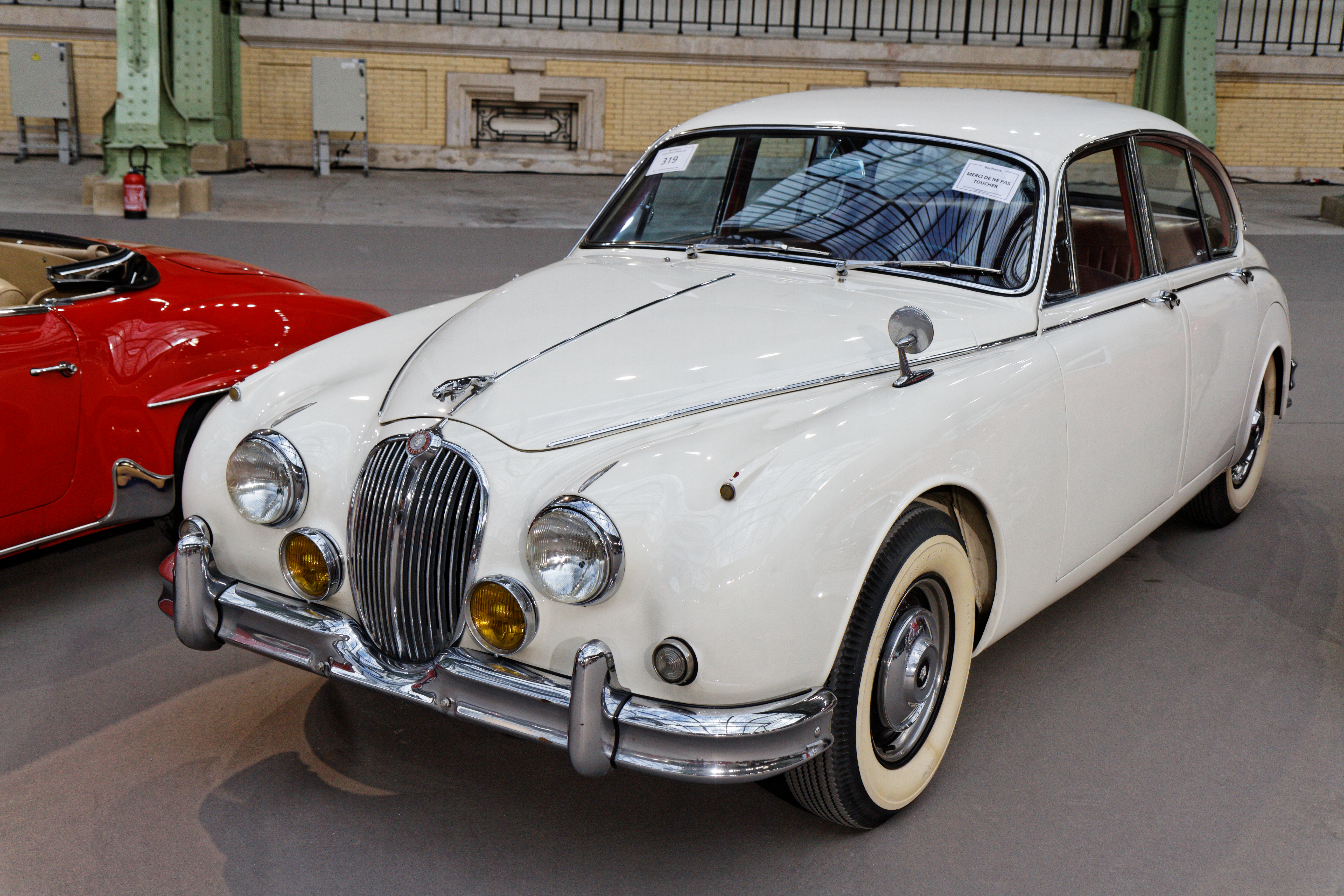 Une Jaguar Mk2 3.8 Litre Sport Saloon au Grand Palais lors de la vente Bonhams en février 2014.